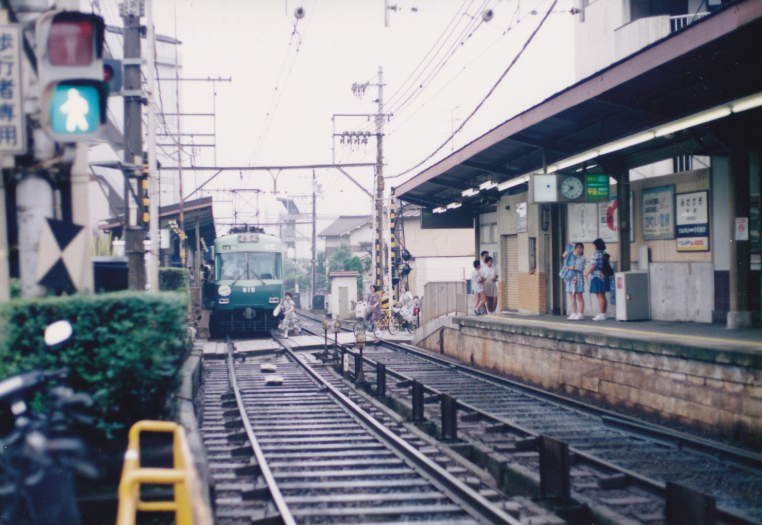 地上時代の京阪御陵駅ホーム